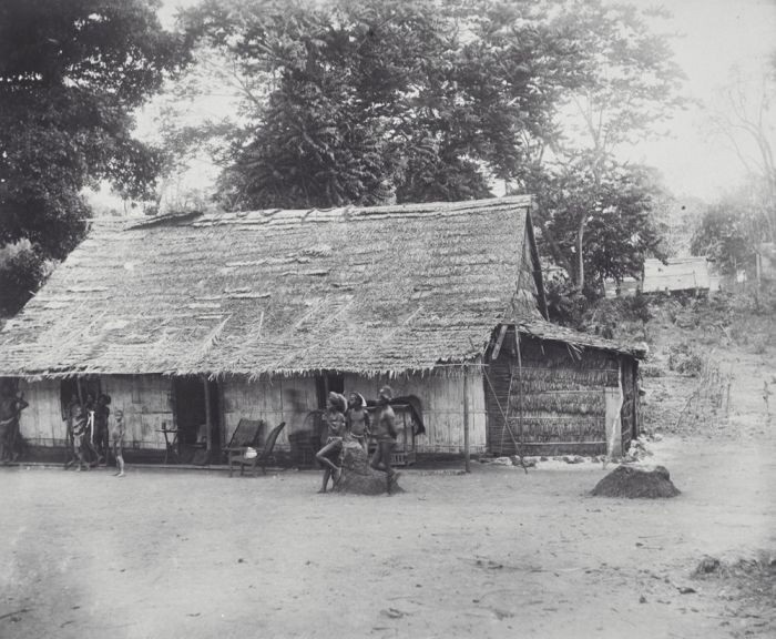 Foto. Het huis van de posthouder op het eiland Sera